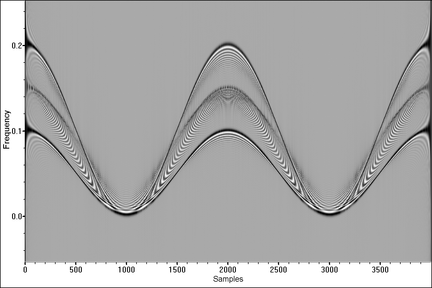 Wigner-Ville distribution (размер окна=500 отсчетов)